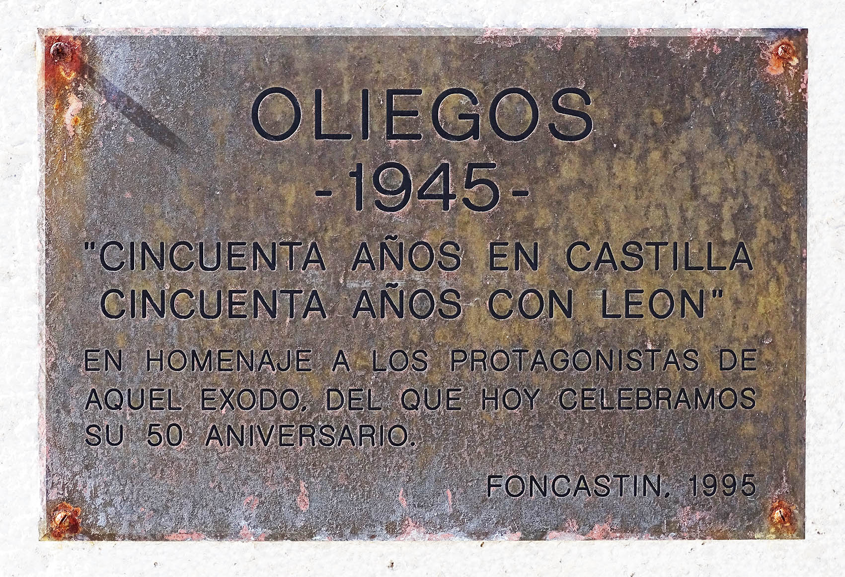 Foncastín (Valladolid, España). Fuente en la plaza Mayor con estatua homenaje a las mujeres de Oliegos.